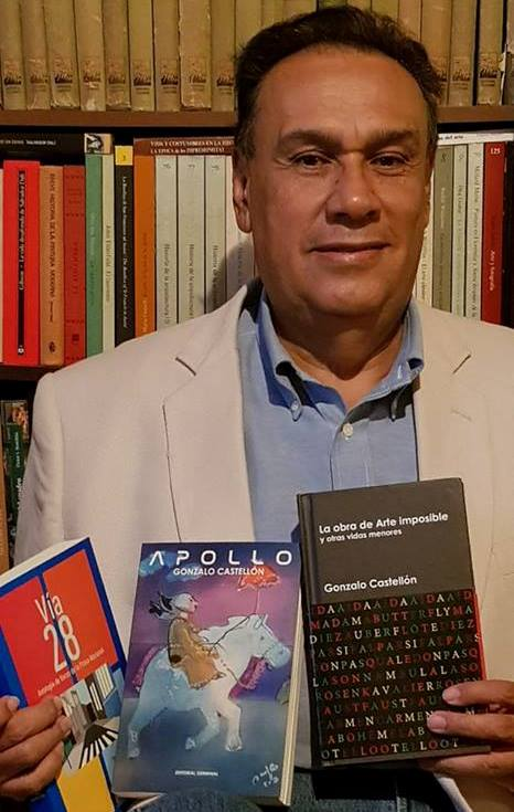 Gonzalo Castellón escritor, historiador, tenor y abogado. De Costa Rica